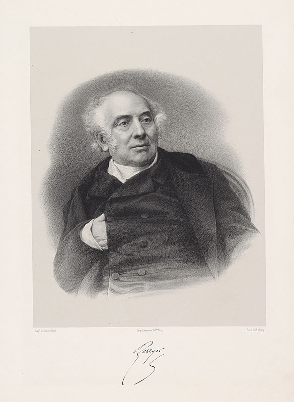 Antoine Pierre Berryer (1790-1868)